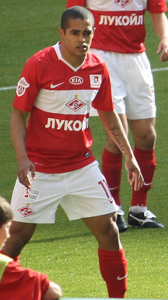 Welliton